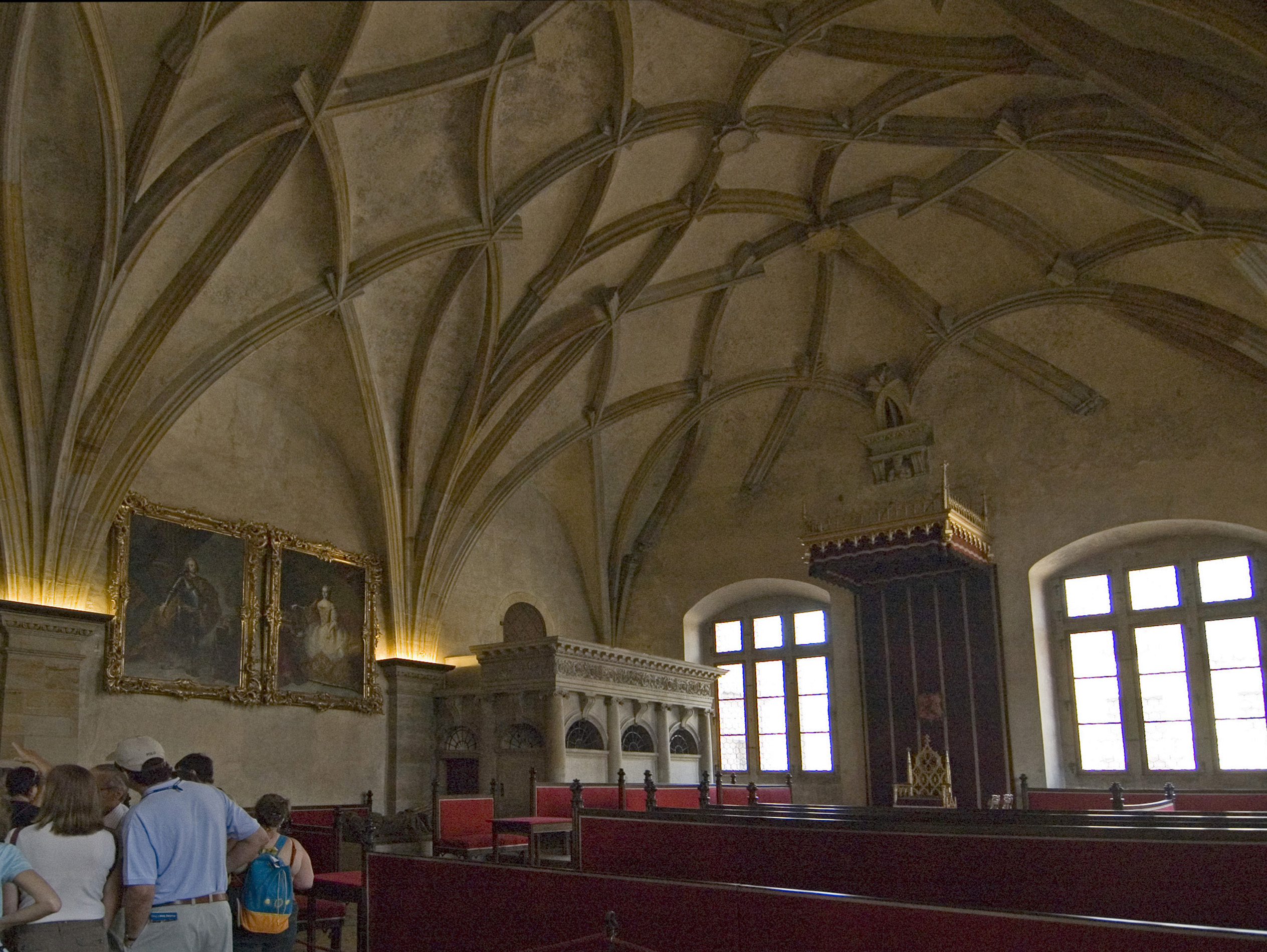 Pražský hrad, Starý královský palác, Sněmovna